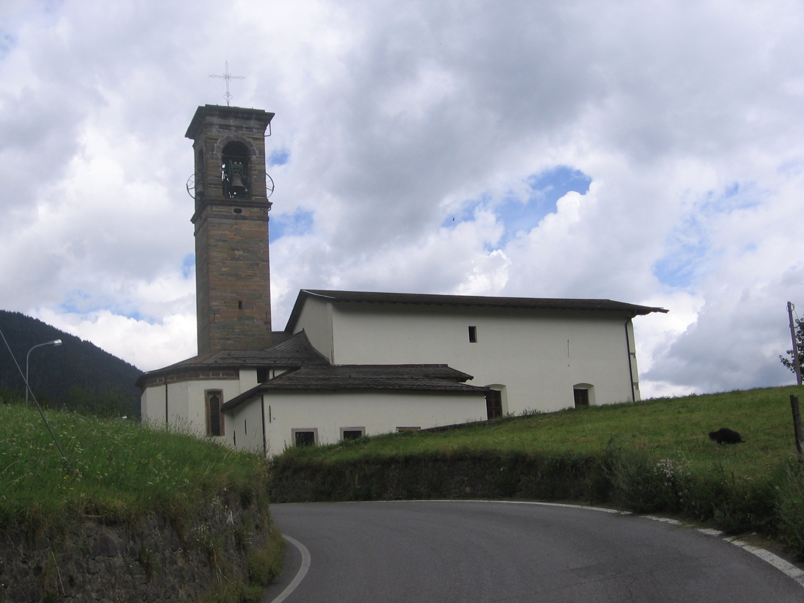 Vilminore di Scalve, Bergamo, Italy